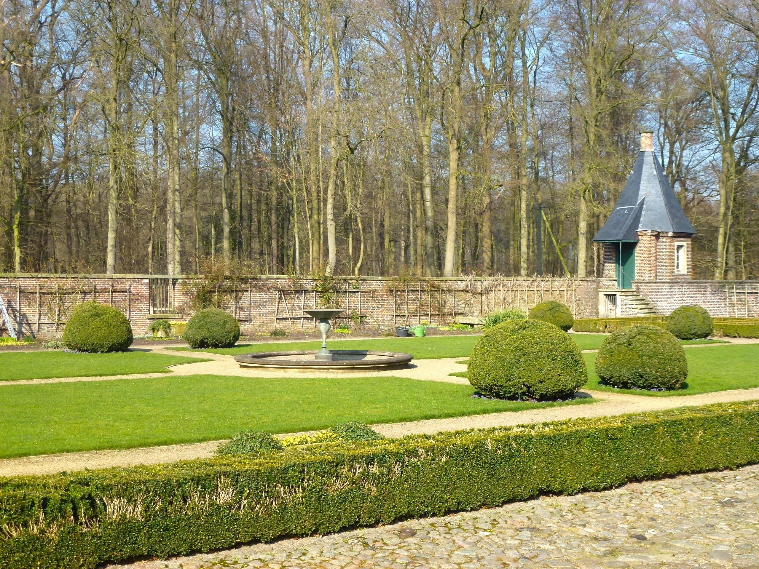 Gartenanlage mit Ecktürmchen